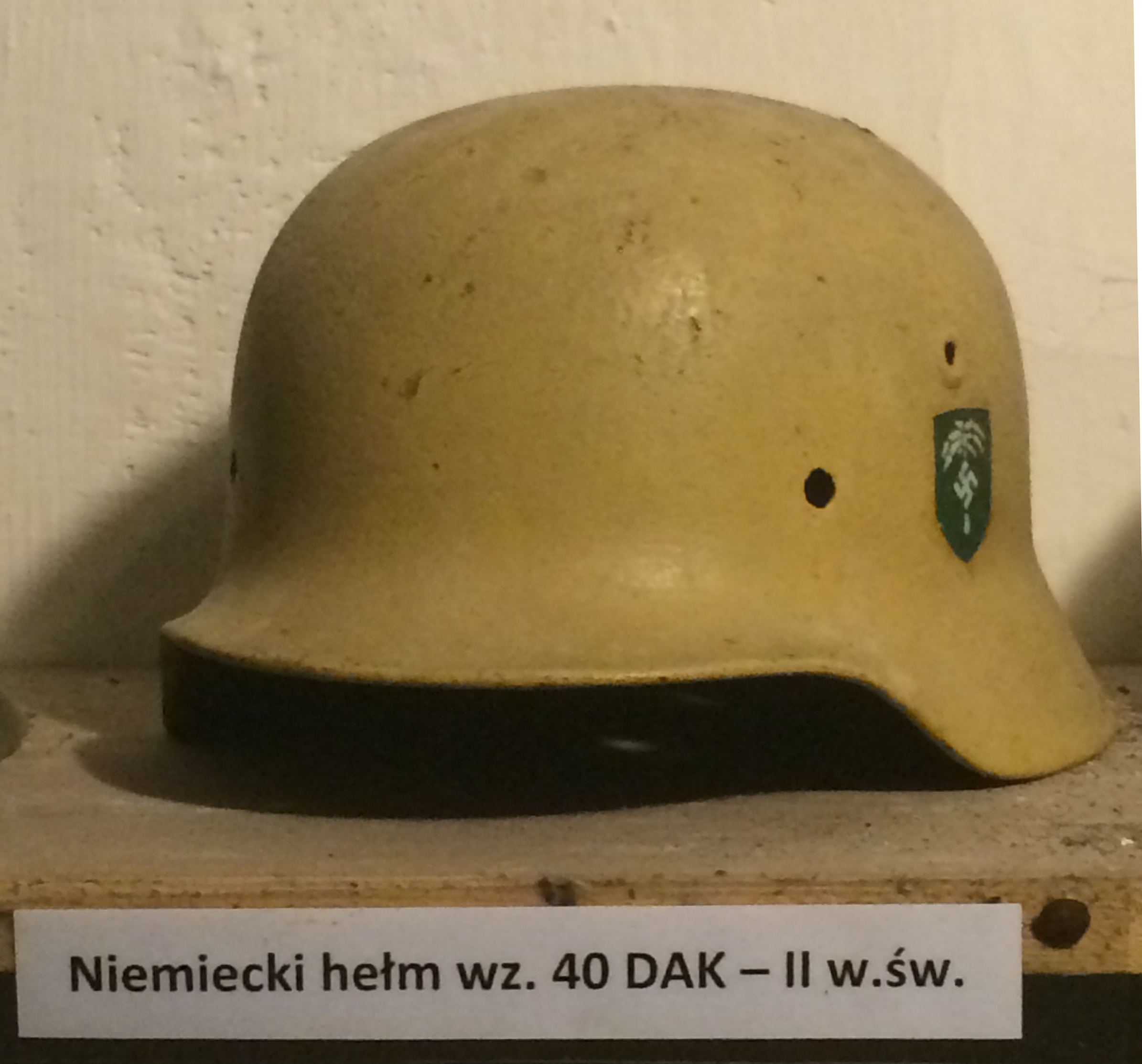 Niemiecki hełm wz. 40 DAK